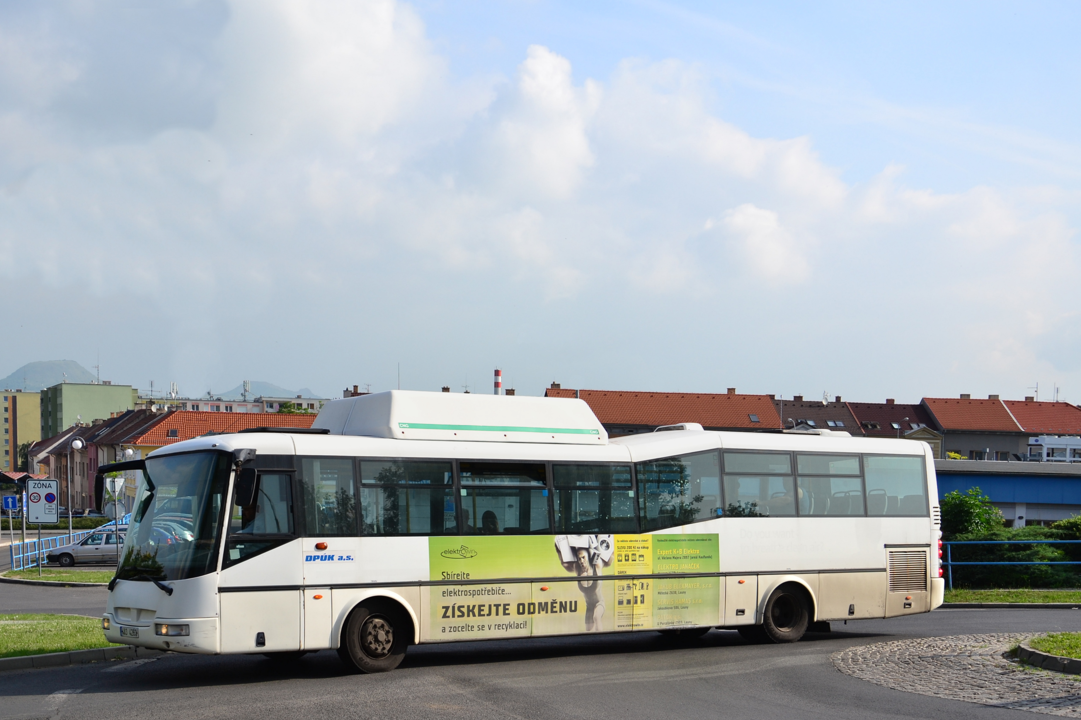 Autobus linky č. 2 přijíždí k zastávce Louny,,Fugnerova přes kruhový objezd Josefa Fouska – Fügnerova, v pozadí supermarket Hrnčířská 2700, vlevo autobusové nádraží.